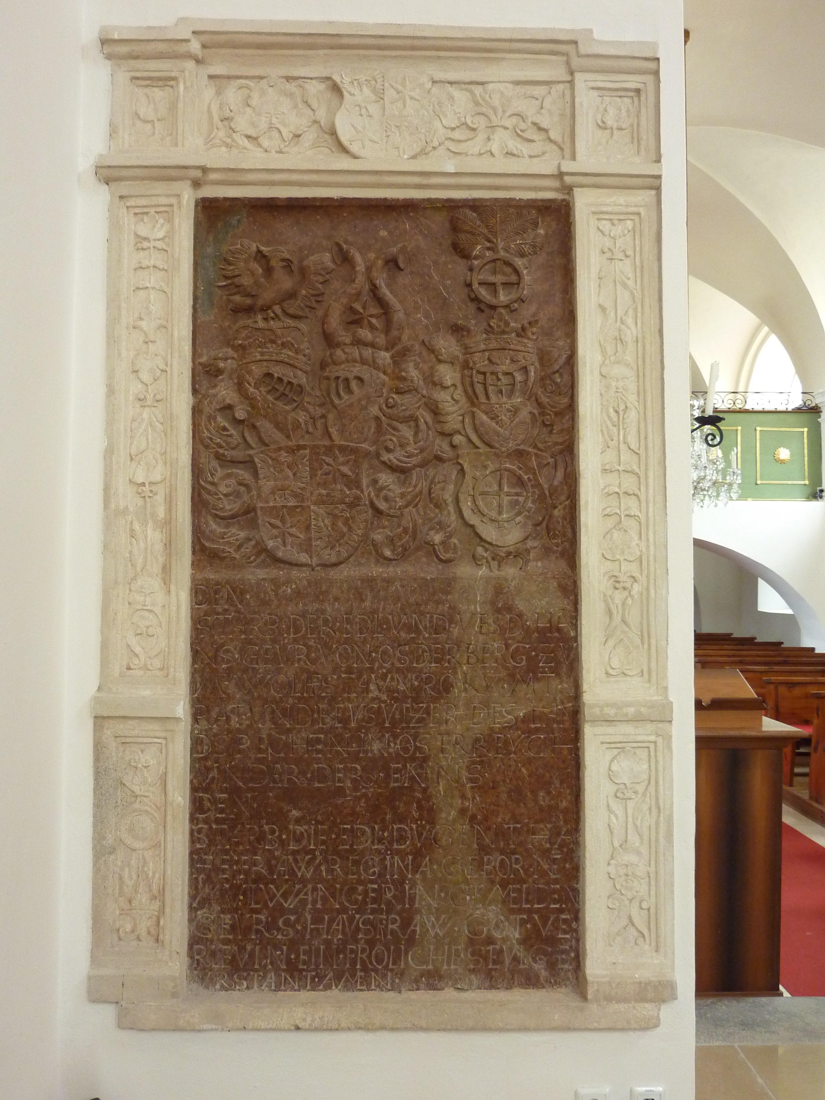 Pfarrkirche Gansbach (Gemeinde Dunkelsteinerwald) in Niederösterreich - Gendenkstein für Hans Geyer von Osterburg und Gattin Regina Originalinschrift: DEN ... STARB DER EDL VND VESD HA// NS GEVR VON OSDERBERG ZU// M WOLHFSTAVN RÖKV MT// RAT VND BEVSVTZER DES LAN// DS RECHTEN IN OS(TE)RREVCH// VNDER DER ENNS DEN ... STARB DIE EDL DÜGENTHA// FTE FRAW REGINA GEBOR(NE)// MVLWANGERIN GEMELDEN// GEVRS HAVSFRAW GOT VE// RLEVIN EIN FROLICHE SEVLGE// VRSTANT AMEN Transskipt: den [leere Zeile – Datum fehlt] starb der Edel und Veste Hans Geyr von Osterberg zum Wolfenstein, rö(misch) k(atholicher) M(ajestä)t Rat und Beisitzer des Landrechts in Österreich unter der Enns. den [leere Zeile – Datum fehlt] starb die edel tugendhafte Frau Regina geborene Mühlwanger, gemeldeten Geyrs Hausfrau (=Ehefrau). Gott verleih ihnen ein fröhliches seeliges Auferstehen. Amen.